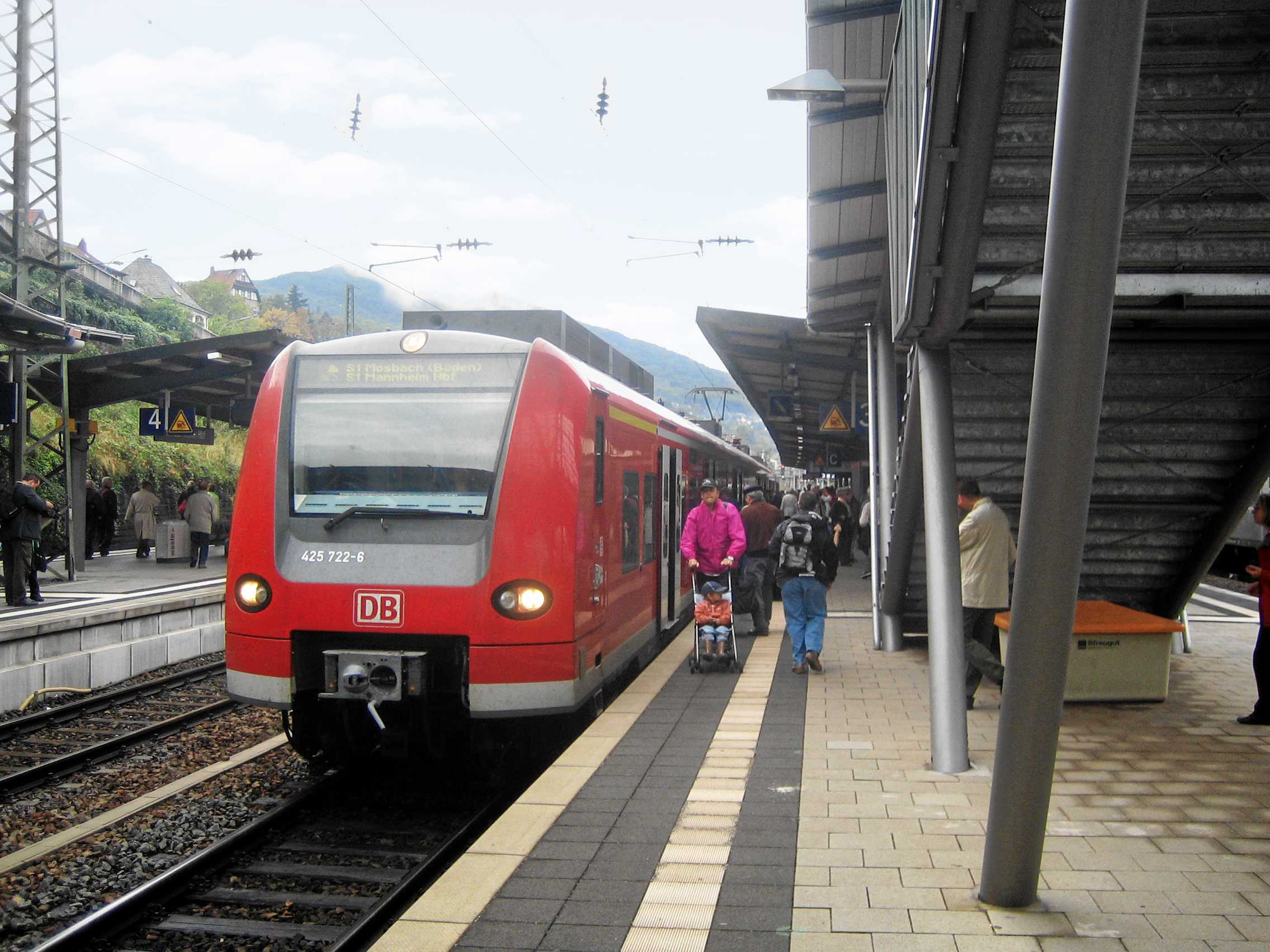 S-Bahn RheinNeckar im Hbf. von Neustadt/Wstr., selbst Fotografiert